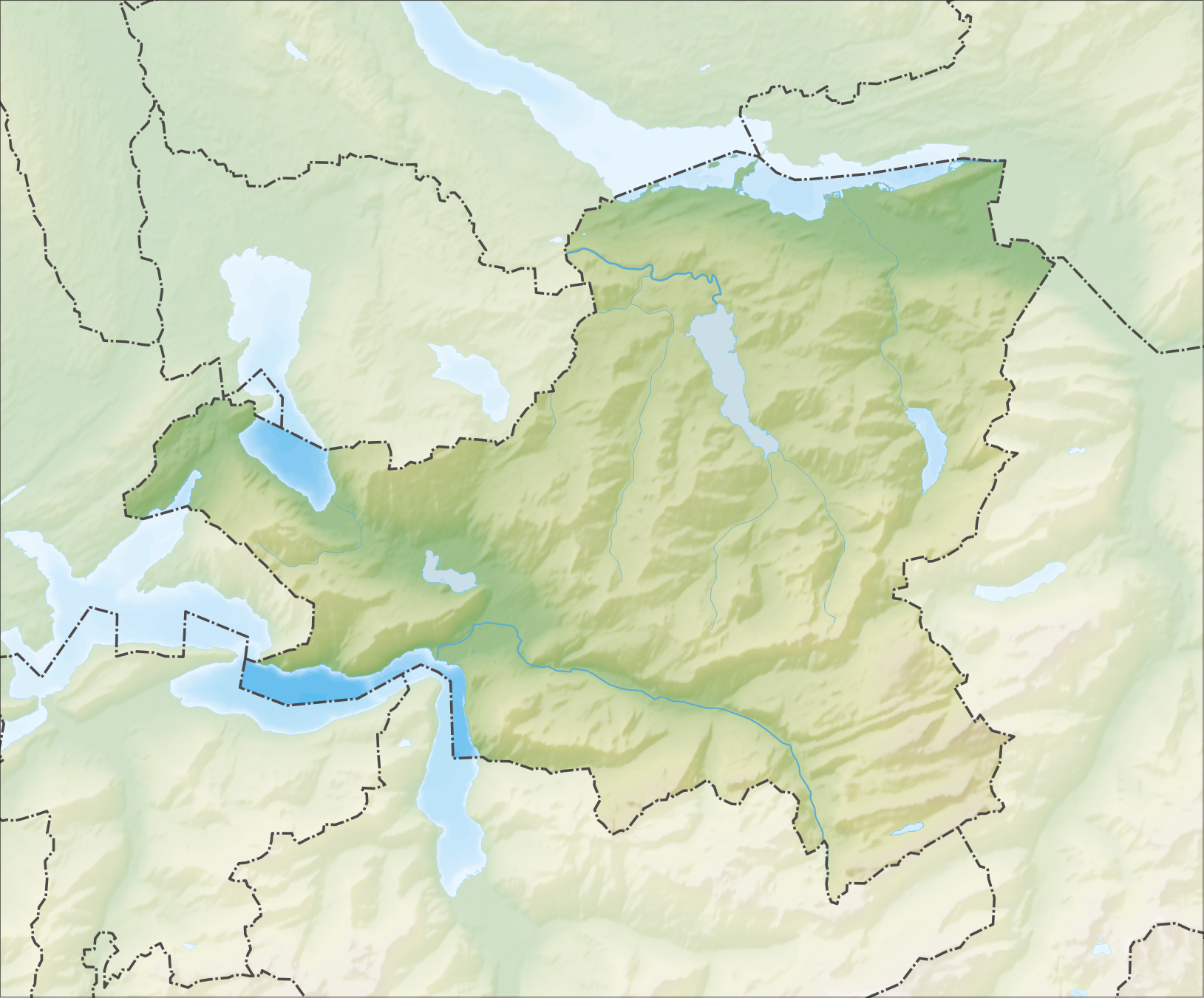 Reliefkarte des Kantons Schwyz Topographischer Hintergrund: NASA Shuttle Radar Topography Mission (public domain). SRTM3 v.2.